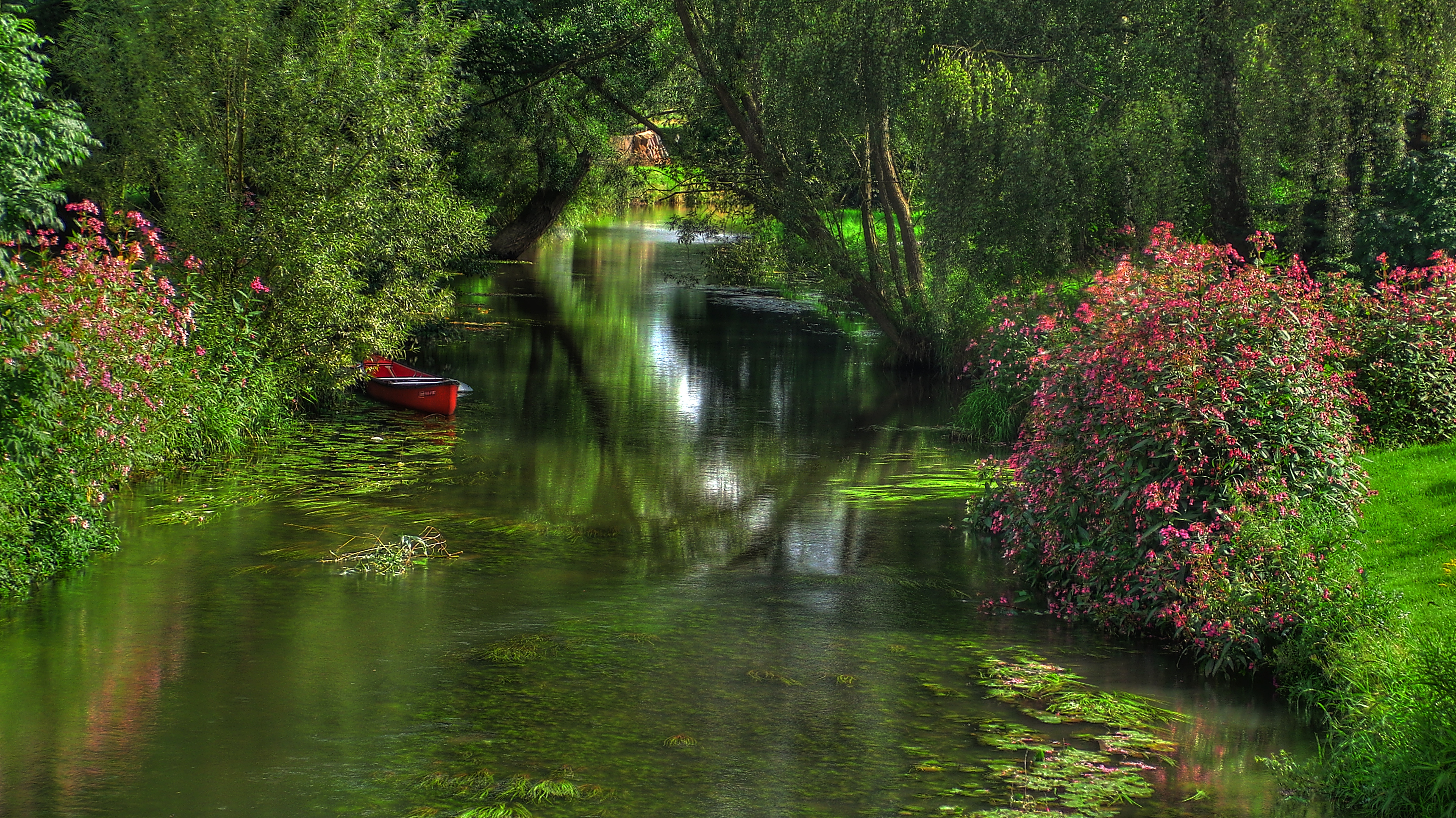 Die Schwalm bei Zella, Willingshausen (HDR)